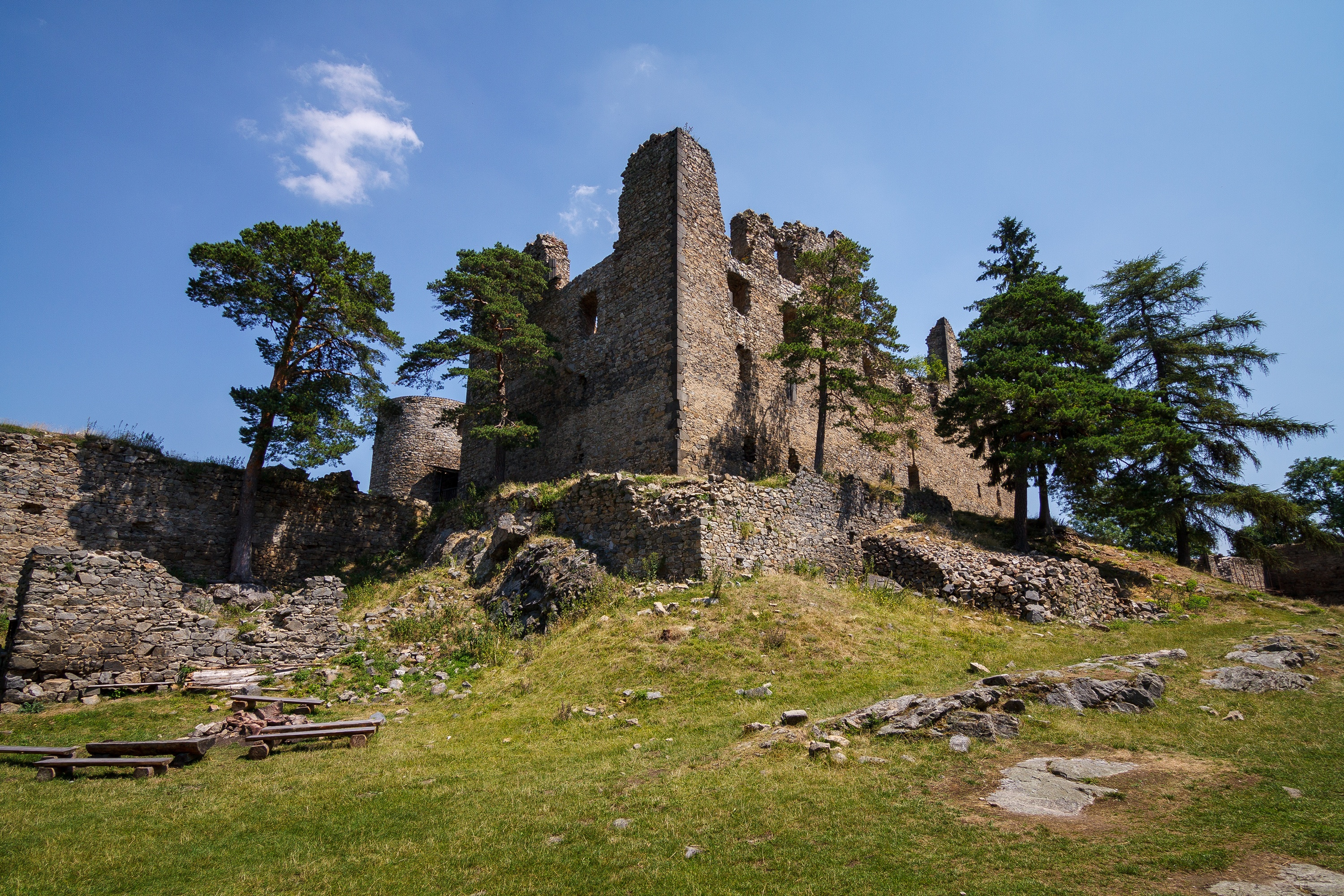 Hrad Helfenburk, Krajníčko.